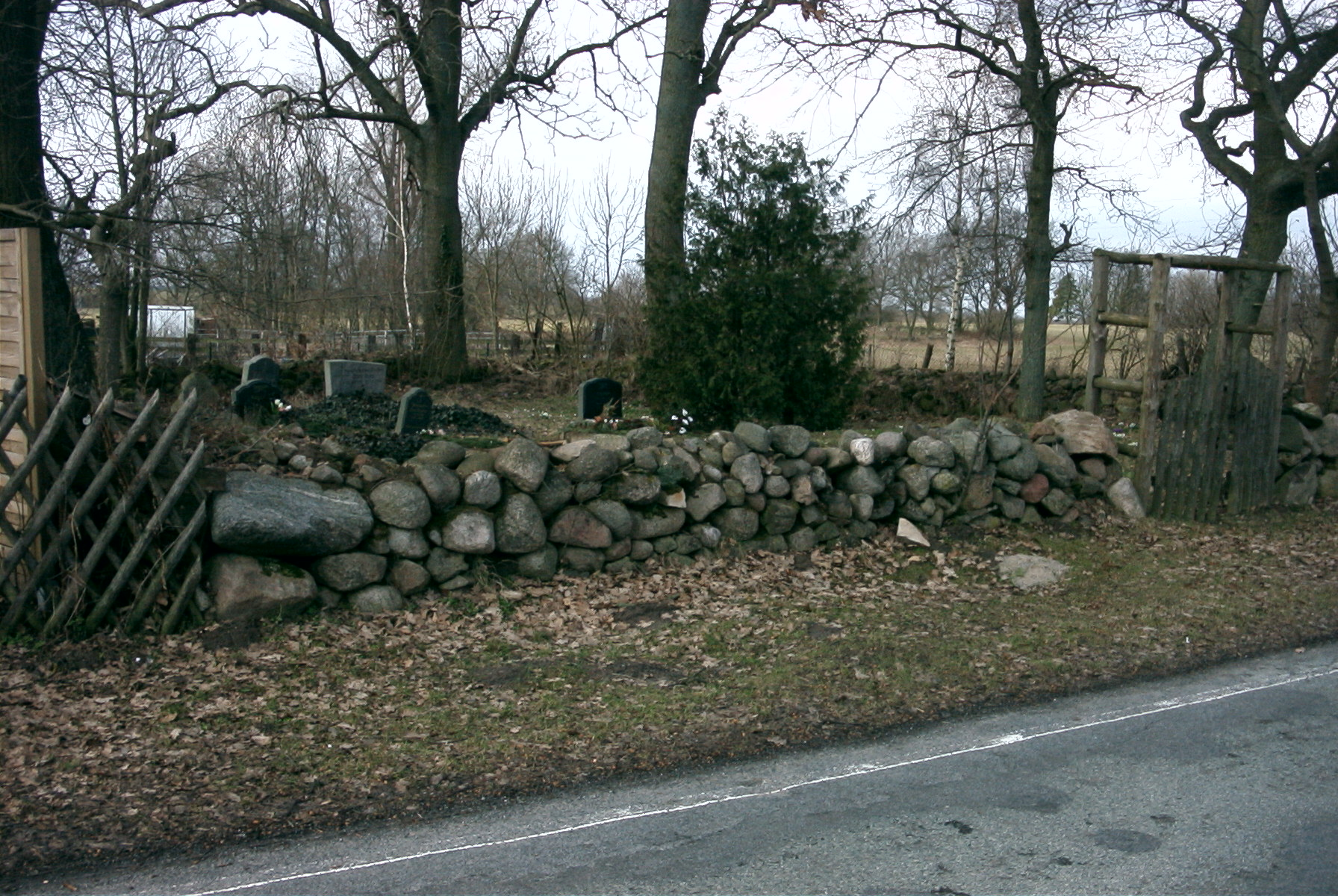 Kleiner Kirchengutsfriedhof Strellin